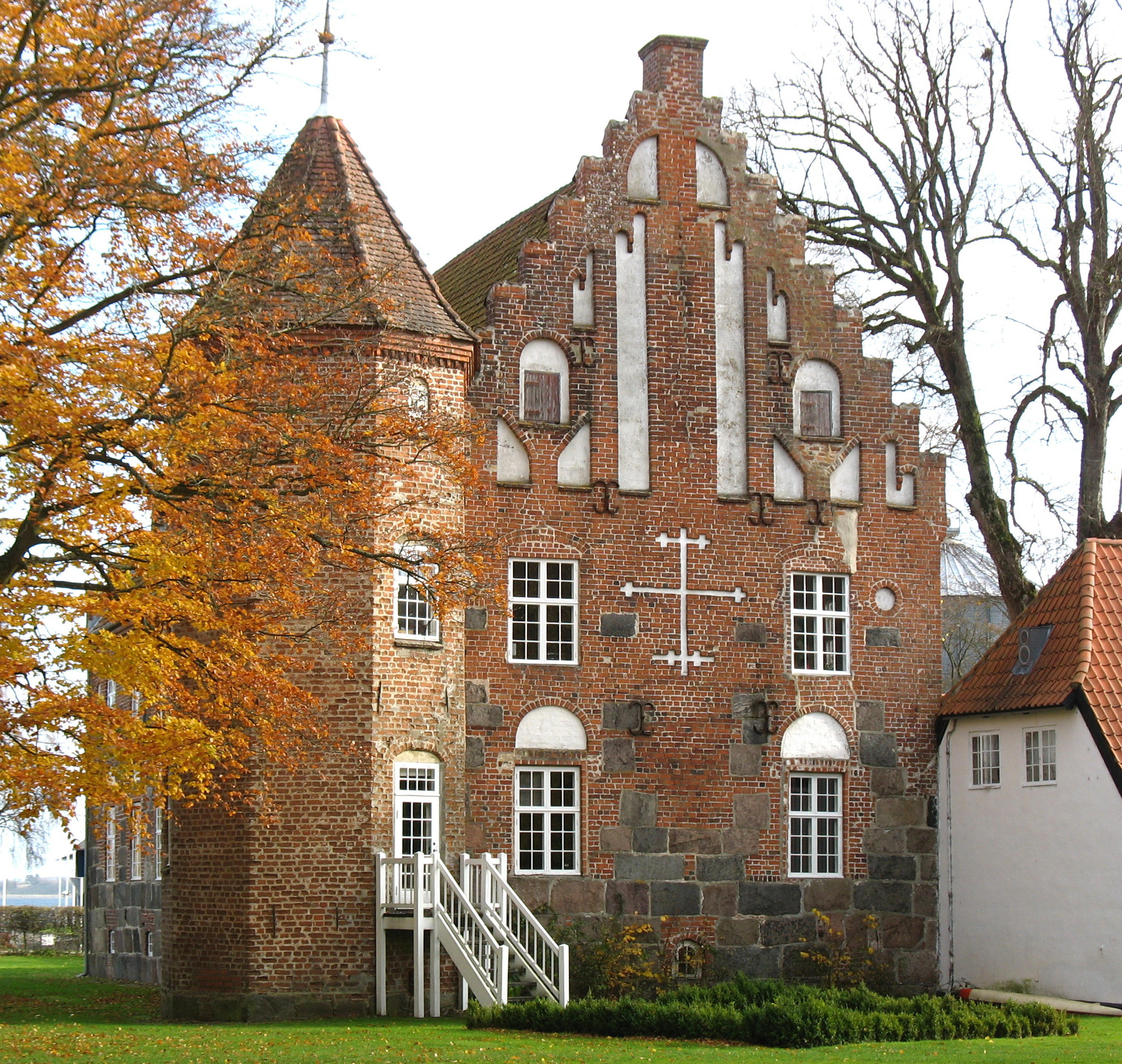 Krabbesholm herregård